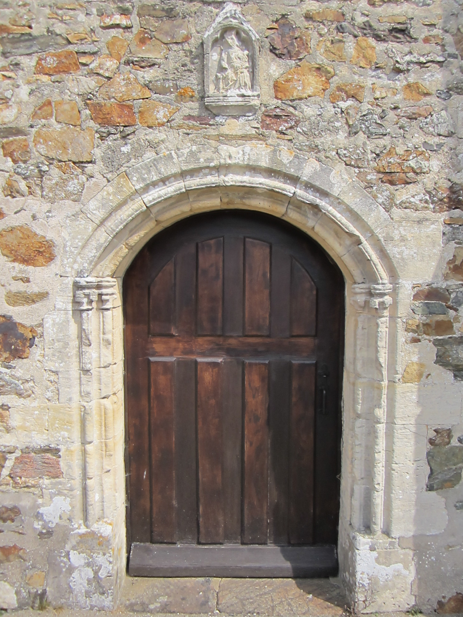 église Saint-Martin de Saint-Martin-d'Aubigny